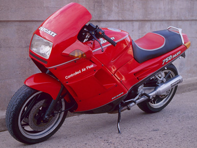 Ducati Paso #751090